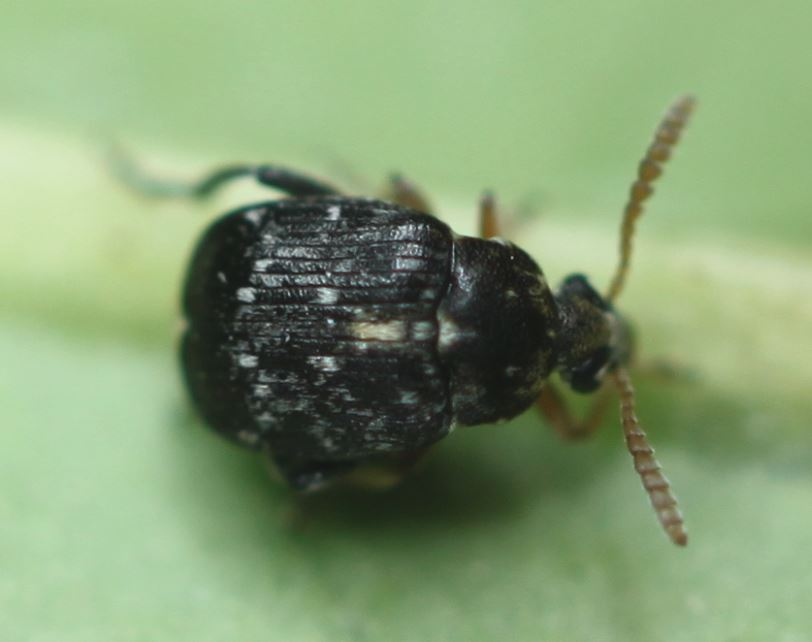 Bruchus luteicornis, Männchen, am 15. Januar 2020